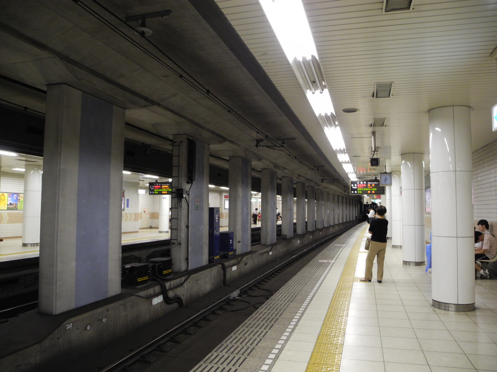 山陽電鉄板宿駅ホーム